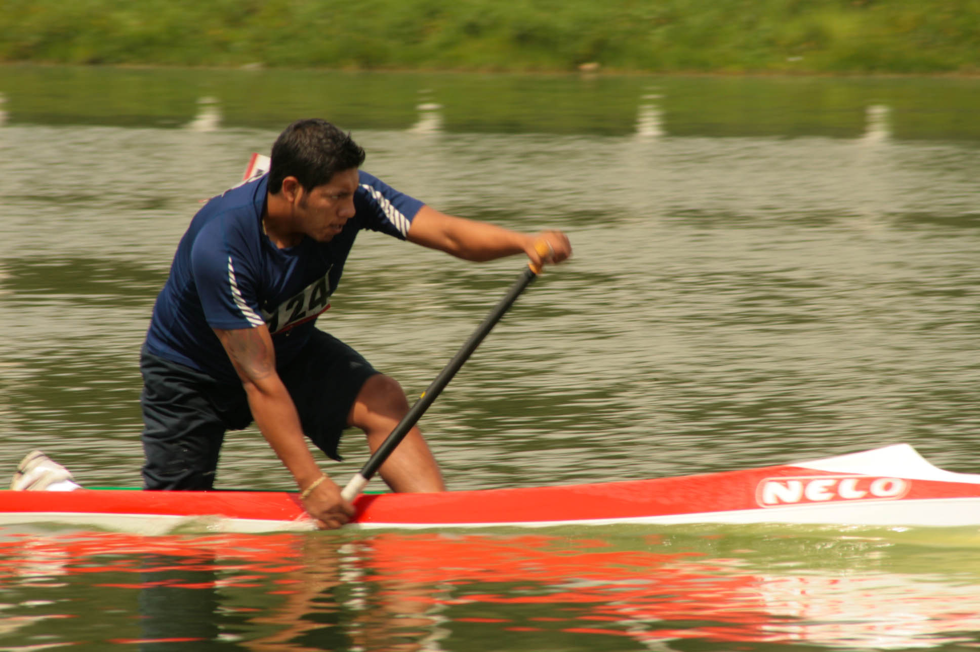 Copa confederaciones 2009